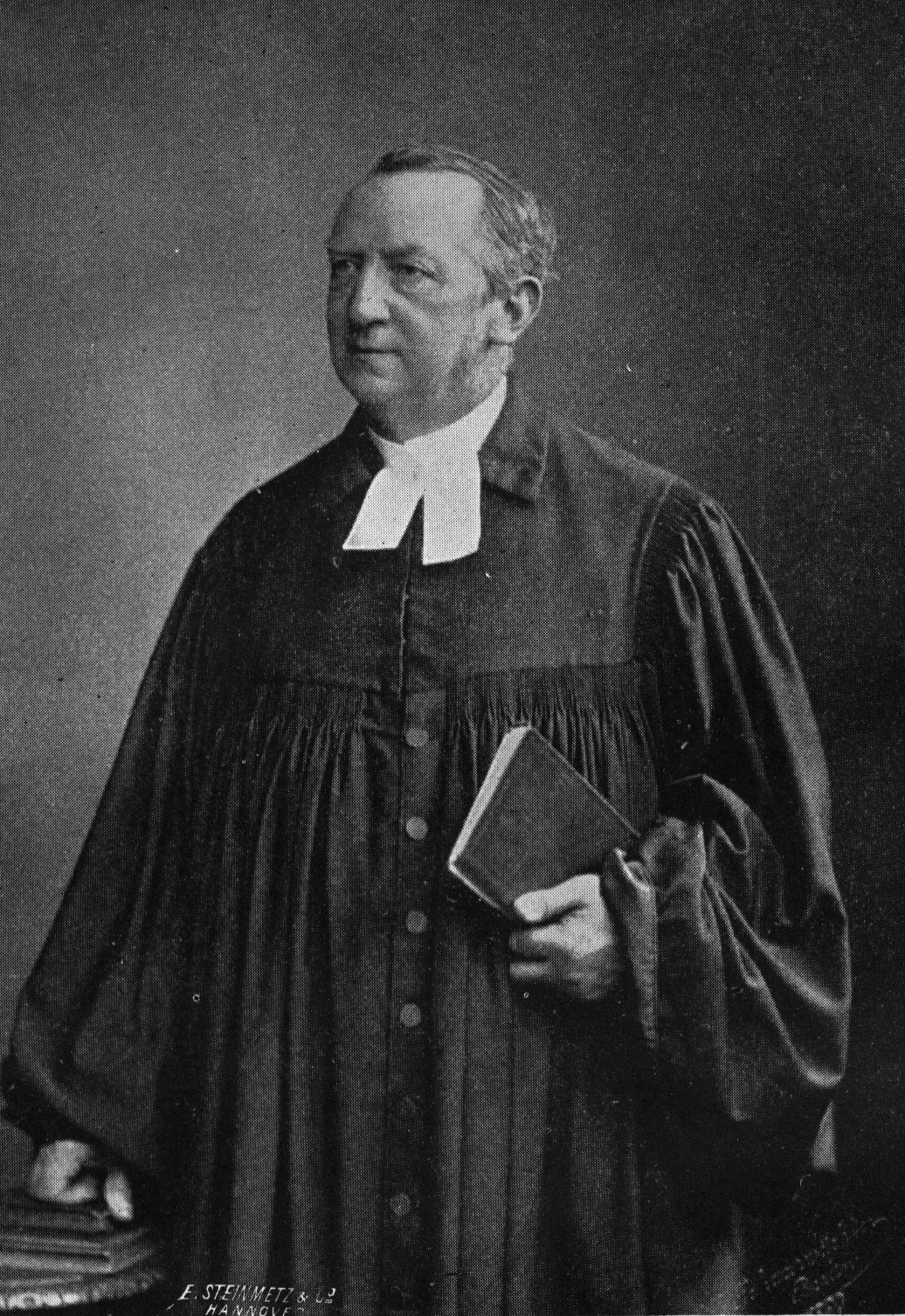 Der Hofprediger Bernhard Rogge mit Talar